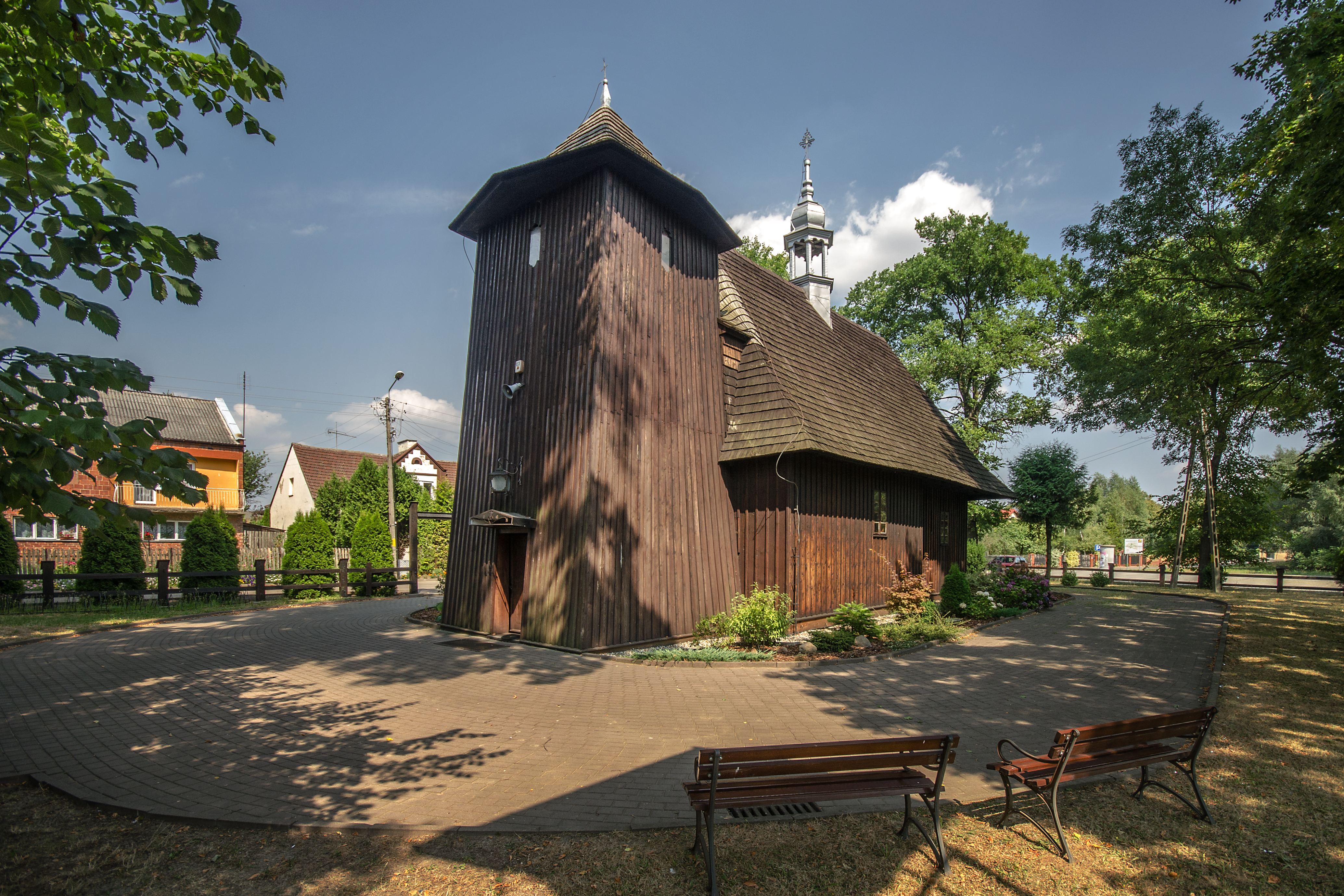 Gaszyn, kościół NMP, pocz. XVI